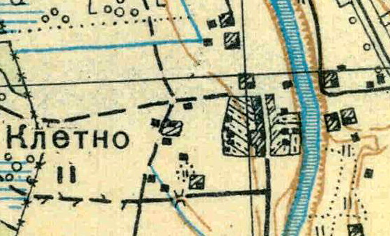 Топографическая карта Ленинградской области, квадрат О-36-25-Б-б (Бол. Слудицы), деревня Клетно